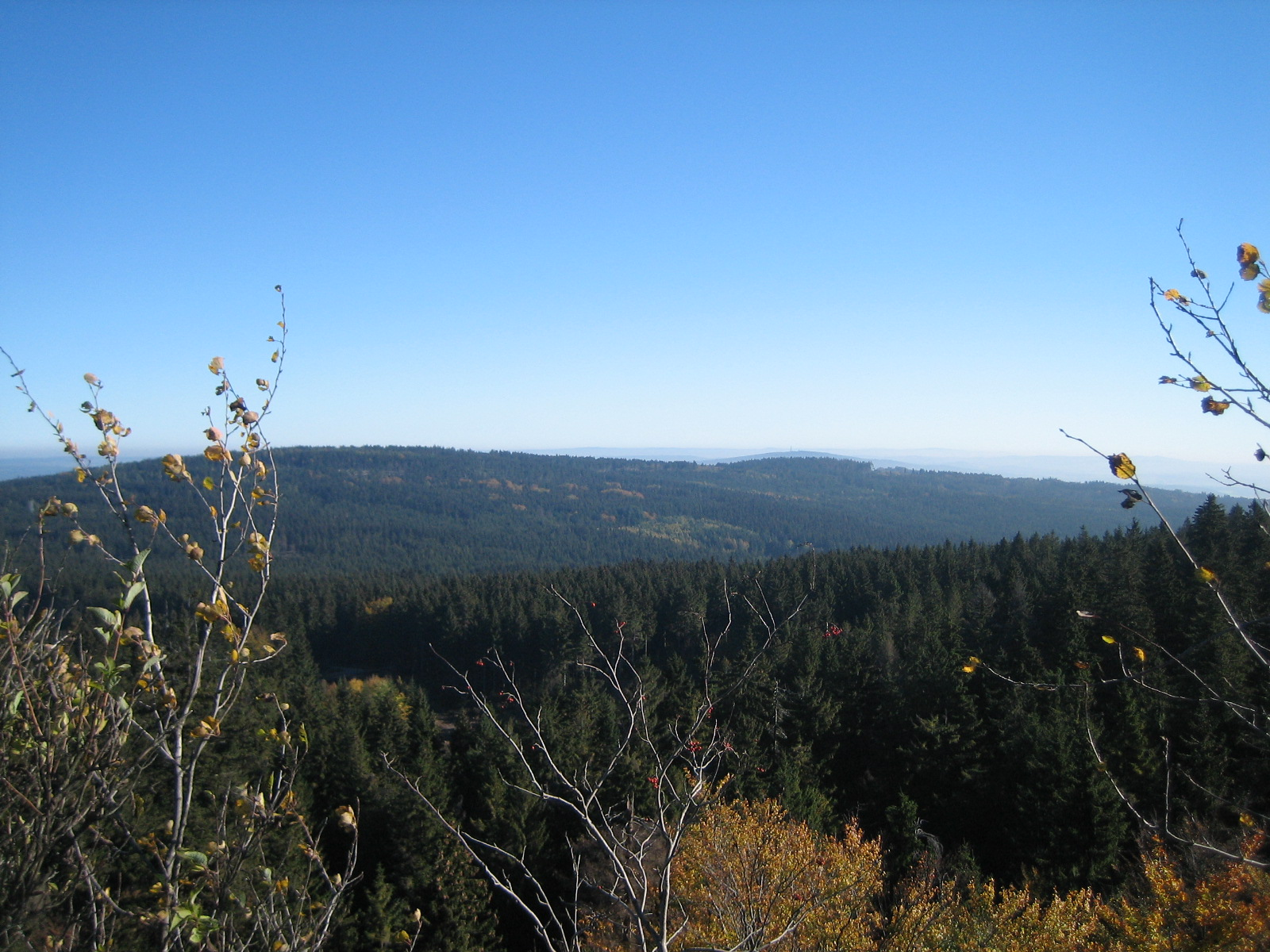 Fichtelgebirge